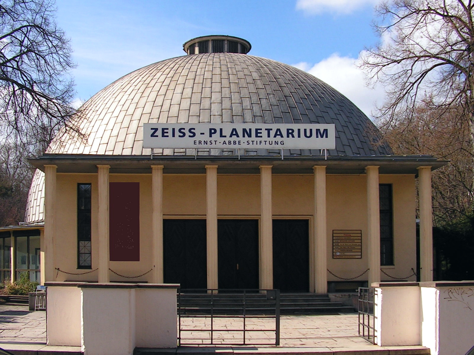 Das älteste im Betrieb befindliche Planetarium ist das Zeiss-Planetarium von 1926 (der Ernst-Abbe-Stiftung) in Jena, Thüringen - Foto Wolfgang Pehlemann Steinberg/Ostsee PICT0028